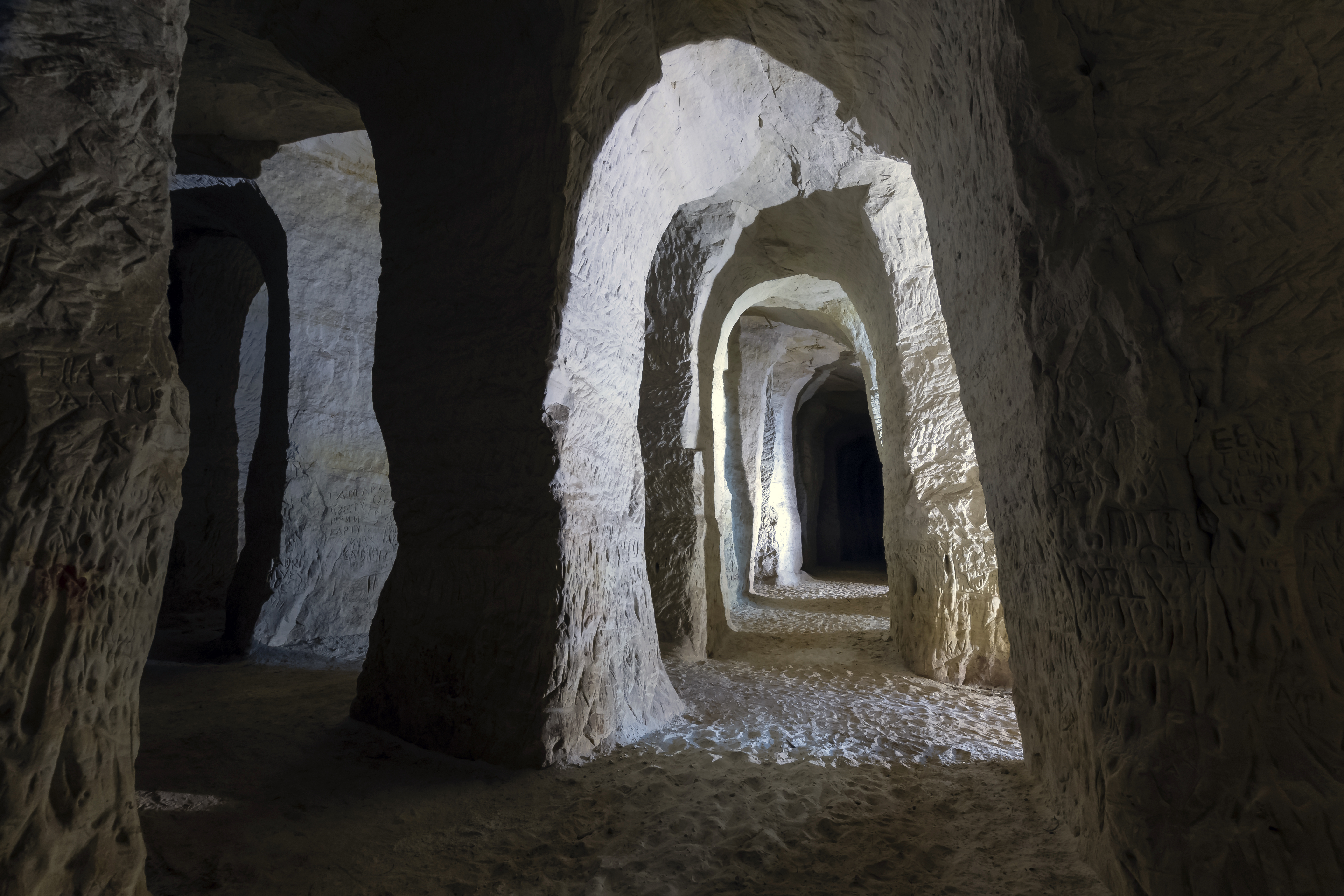 Ландшафтный заповедник Пиуза